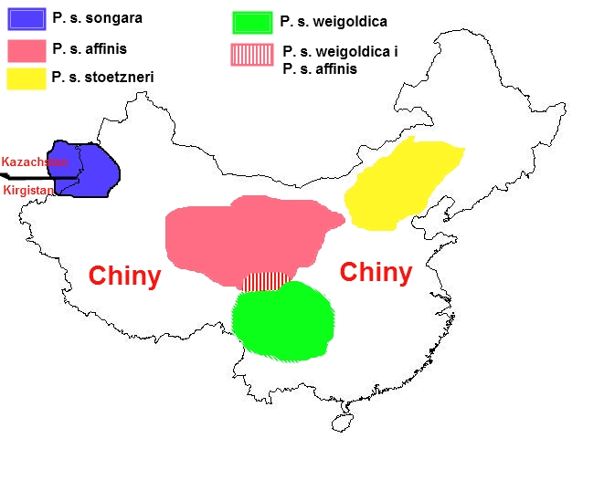 Zasięg podgatunków czarnogłówki brązowawej.